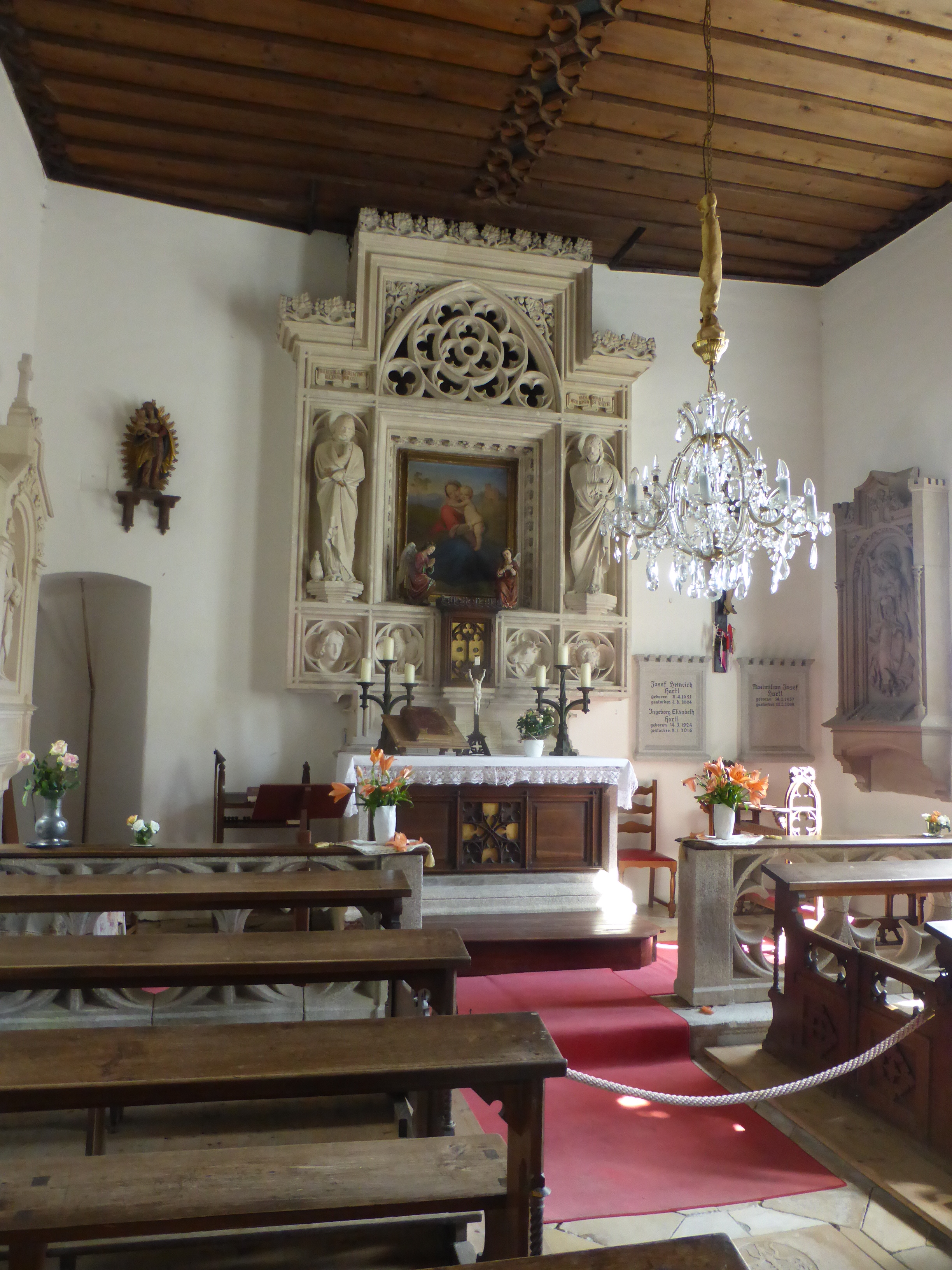 Schloss Egg (Schlosskapelle)